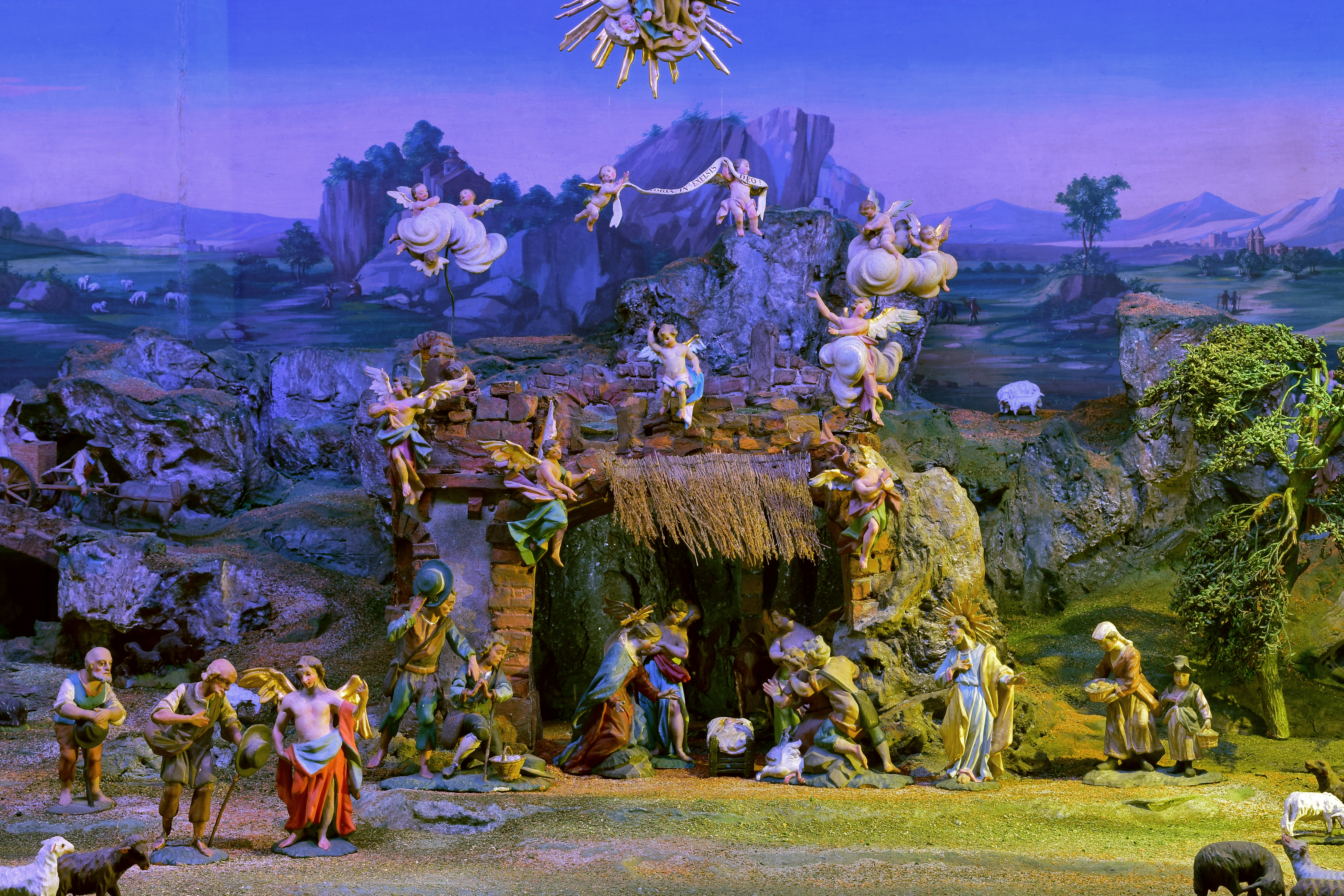 Teil der Krippensammlung im Tiroler Volkskunstmuseum in Innsbruck. Die Brugger Krippe entstand Anfang des 19. Jahrhunderts in Innsbruck und Thaur. Die Figuren fertigte Johann Giner der Ältere, Felix Zimmerling (1812-1869, Thaur) gestaltete den Krippenberg, den Hintergrund malte Johann Leitl (1775-1863, Thaur).